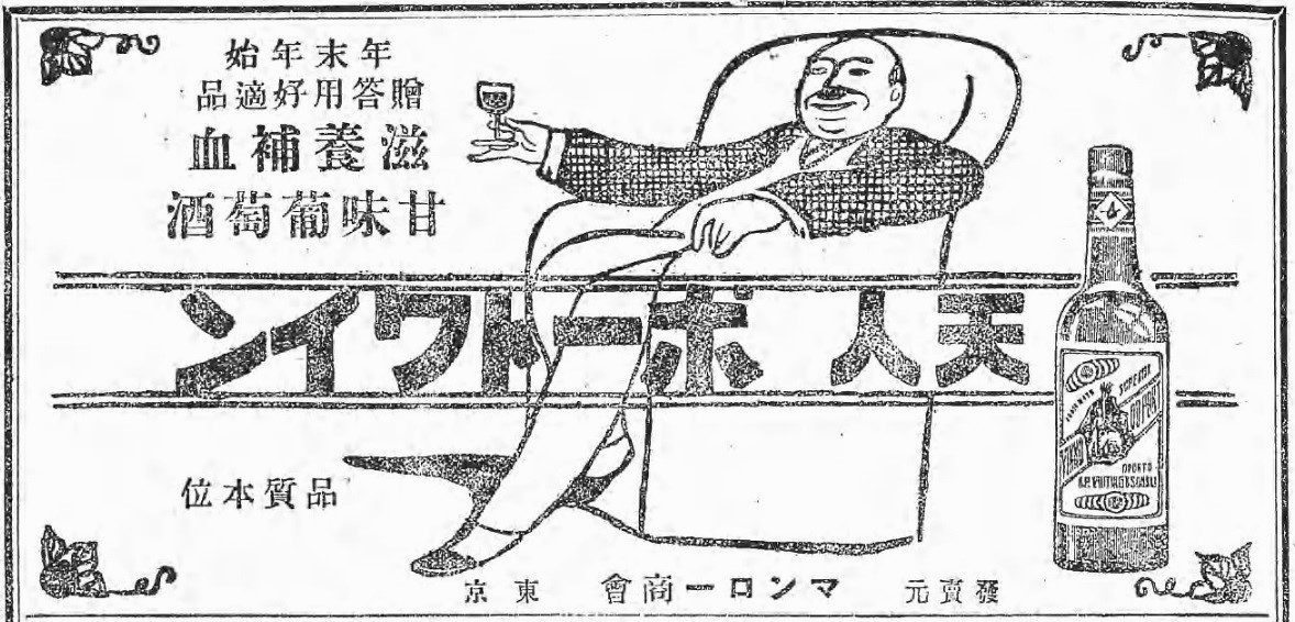 天人ポートワイン 1919